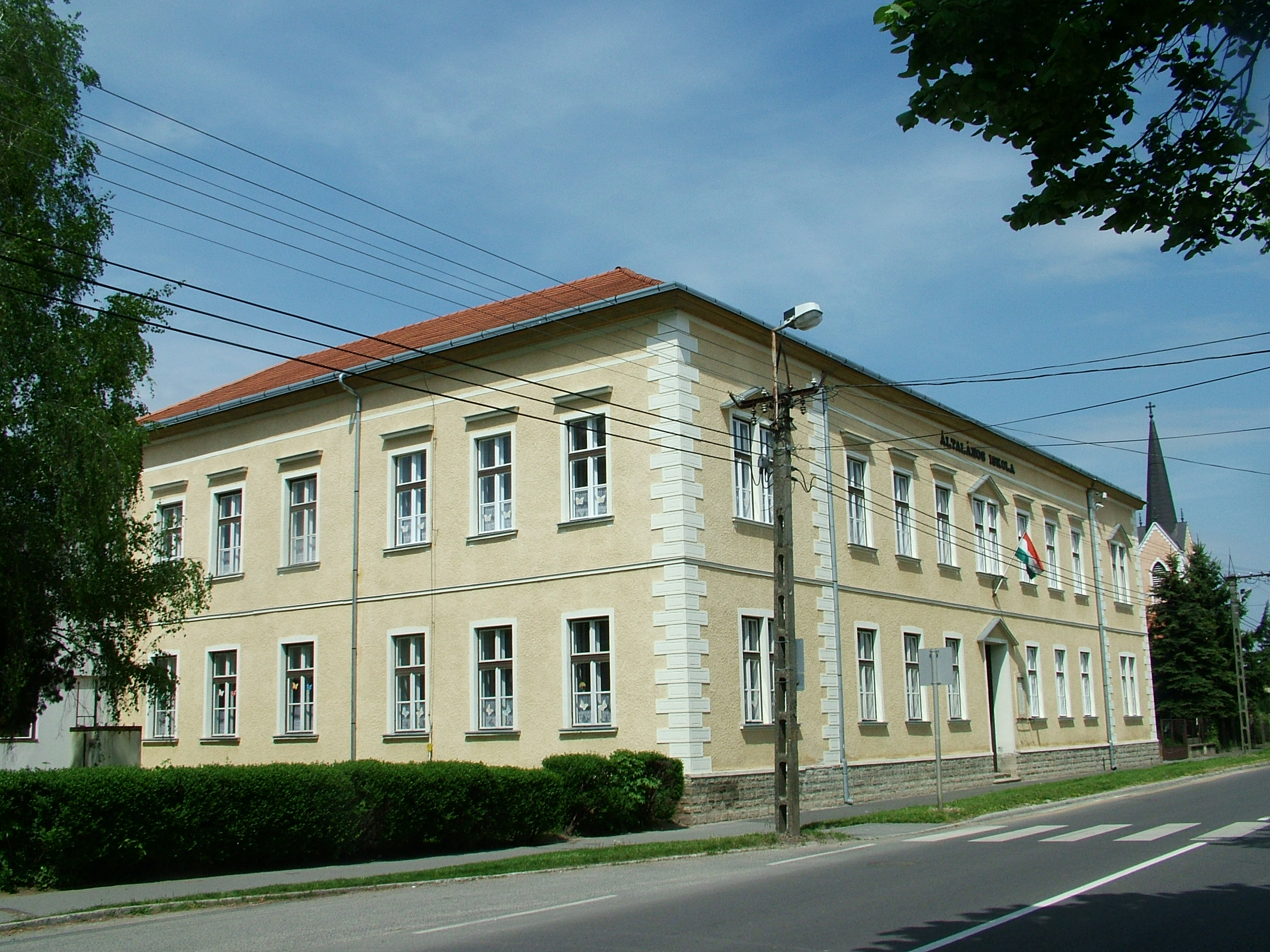 Csányi–Zrínyi Általános Iskola épülete – a Zrínyi Általános Iskola régi szárnya, háttérben az evangélikus templom (Zalaszentgrót, Zala megye)